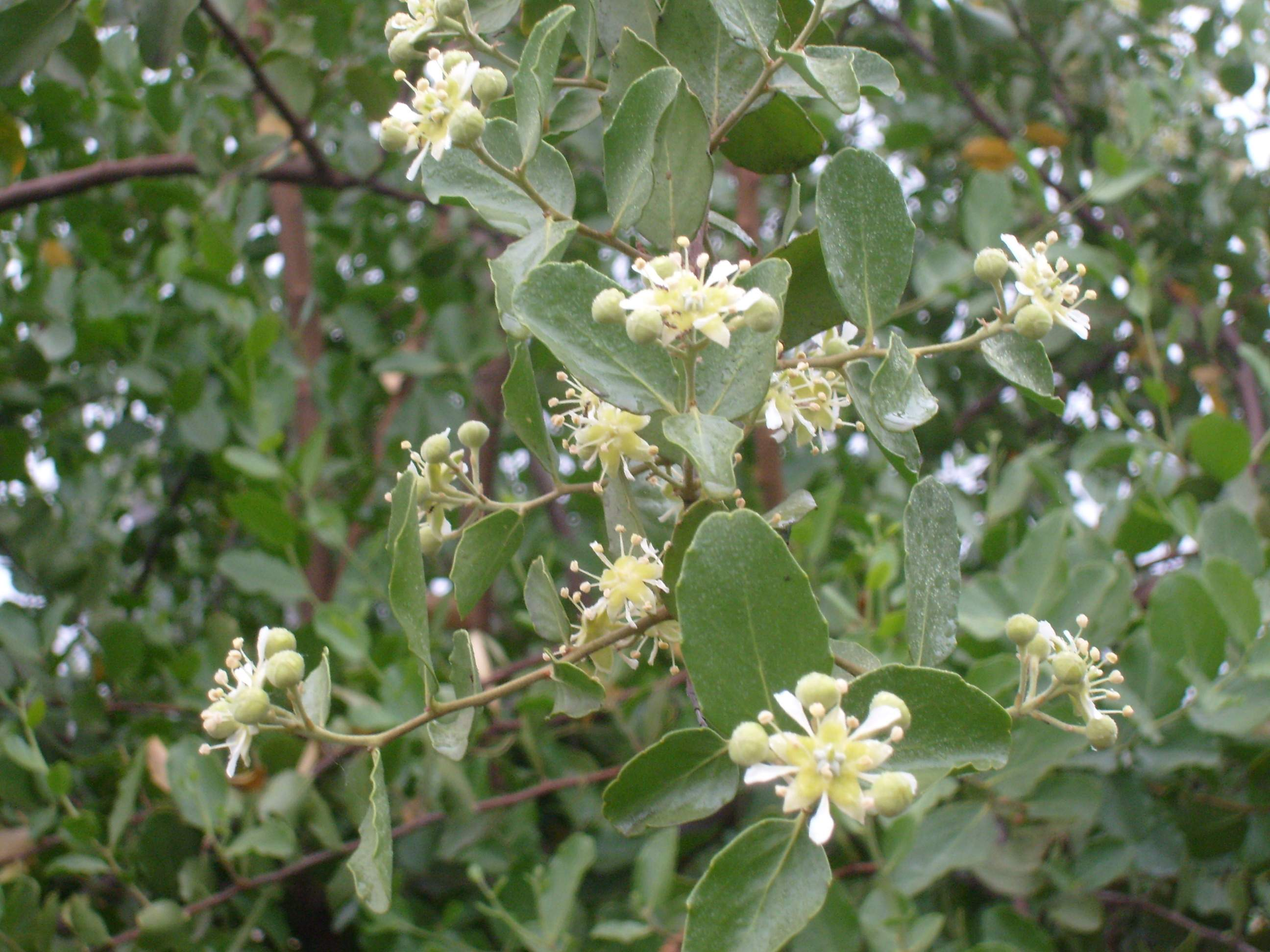 Quillaja saponaria árbol endémico del matorral de Chile Central. ejemplar en cultivo (San Joaquin Santiago)